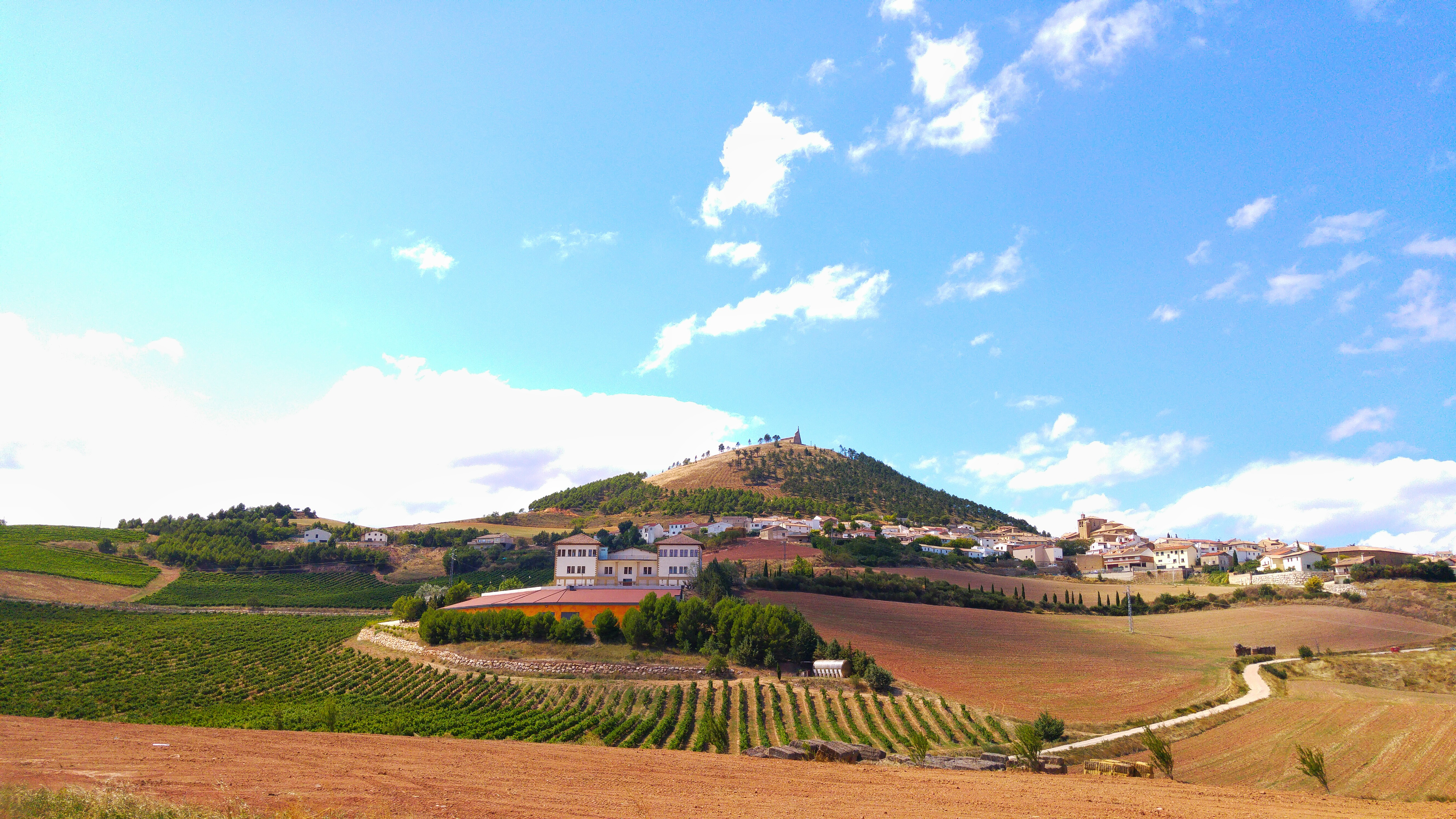 Añorbe